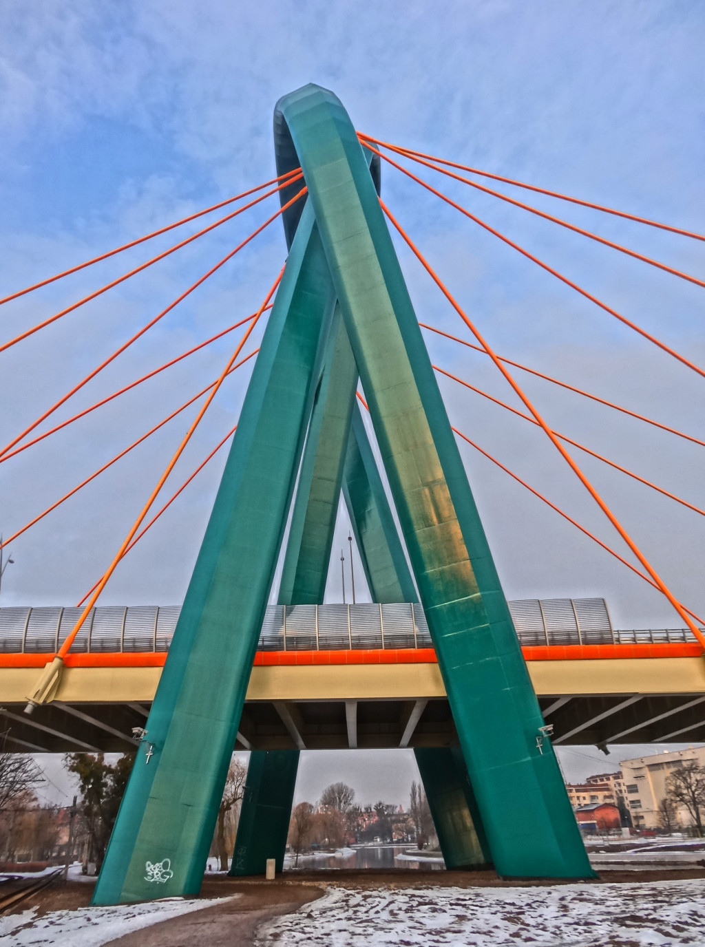 Pylon Trasy Uniwersyteckiej w Bydgoszczy